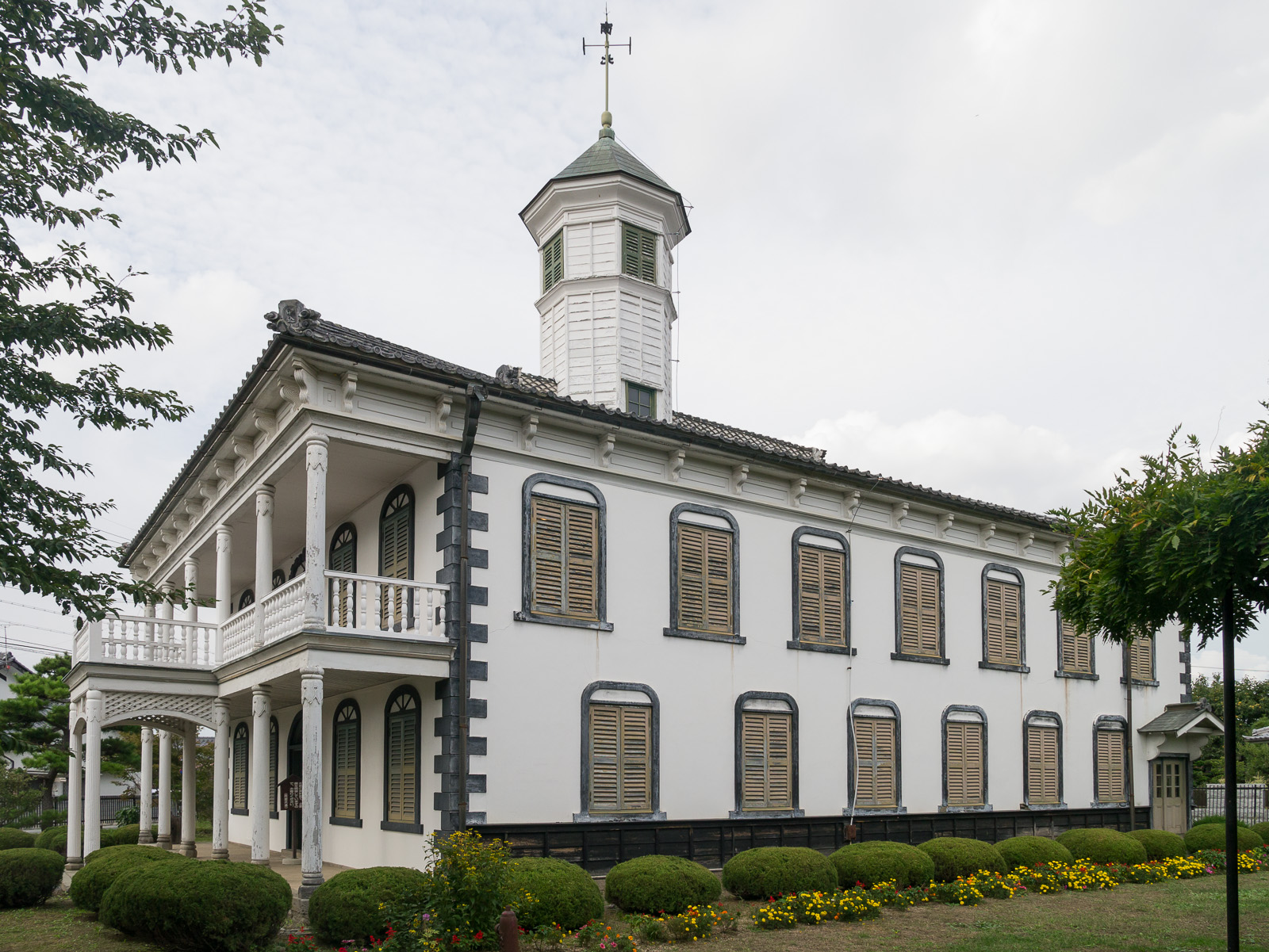 旧中込学校、長野県佐久市。